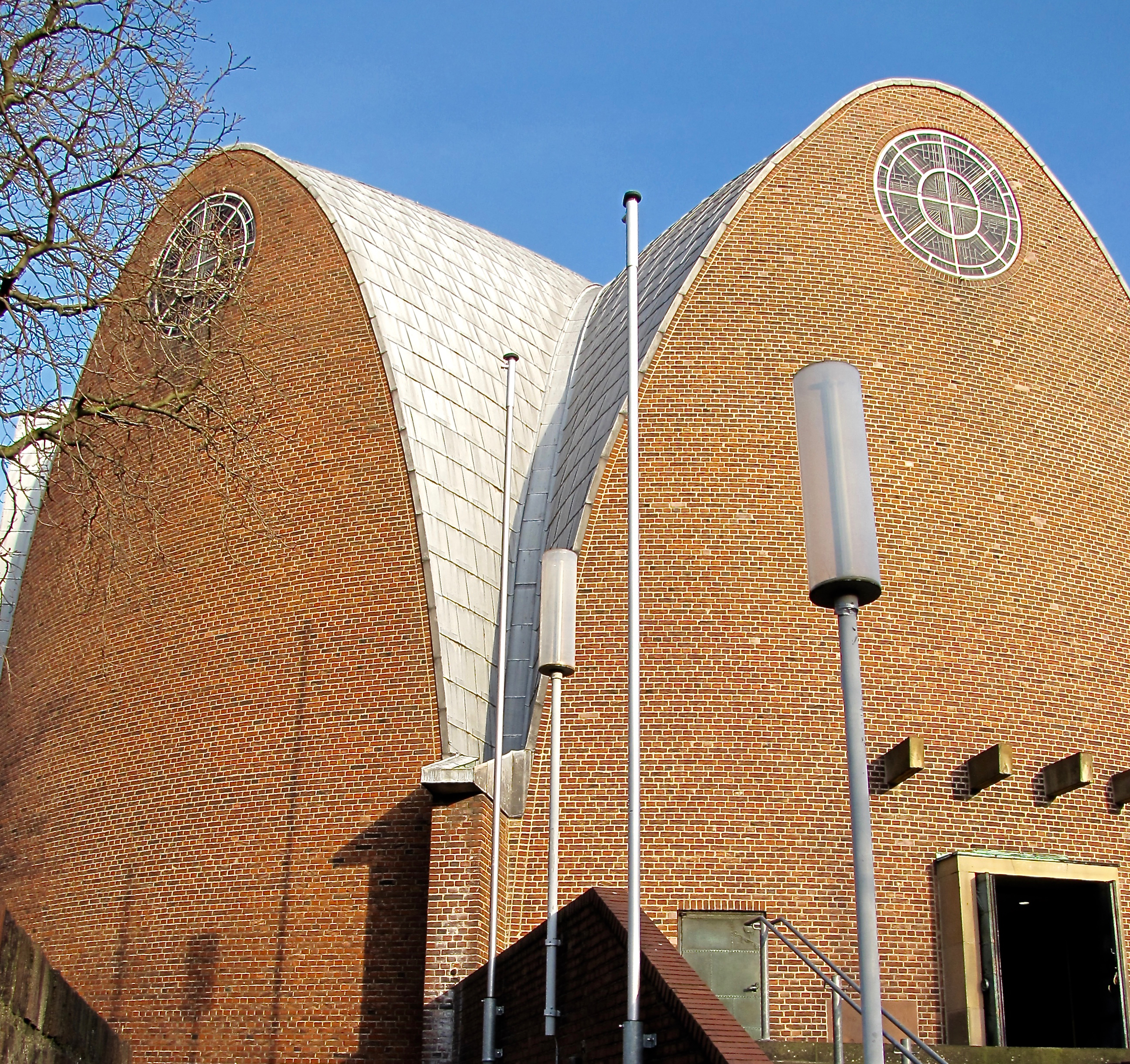 St. Engelbert (Köln-Riehl): Tief gefaltetes Dach zwischen parabelförmigen Schildwänden. Architekt: Dominikus Böhm (1930-1932). Bleideckung erst 1975 realisiert. Böhm: "Das silbrige Blei (steht) in schönstem Gegensatz zu der Backsteinverkleidung der Außenwände."